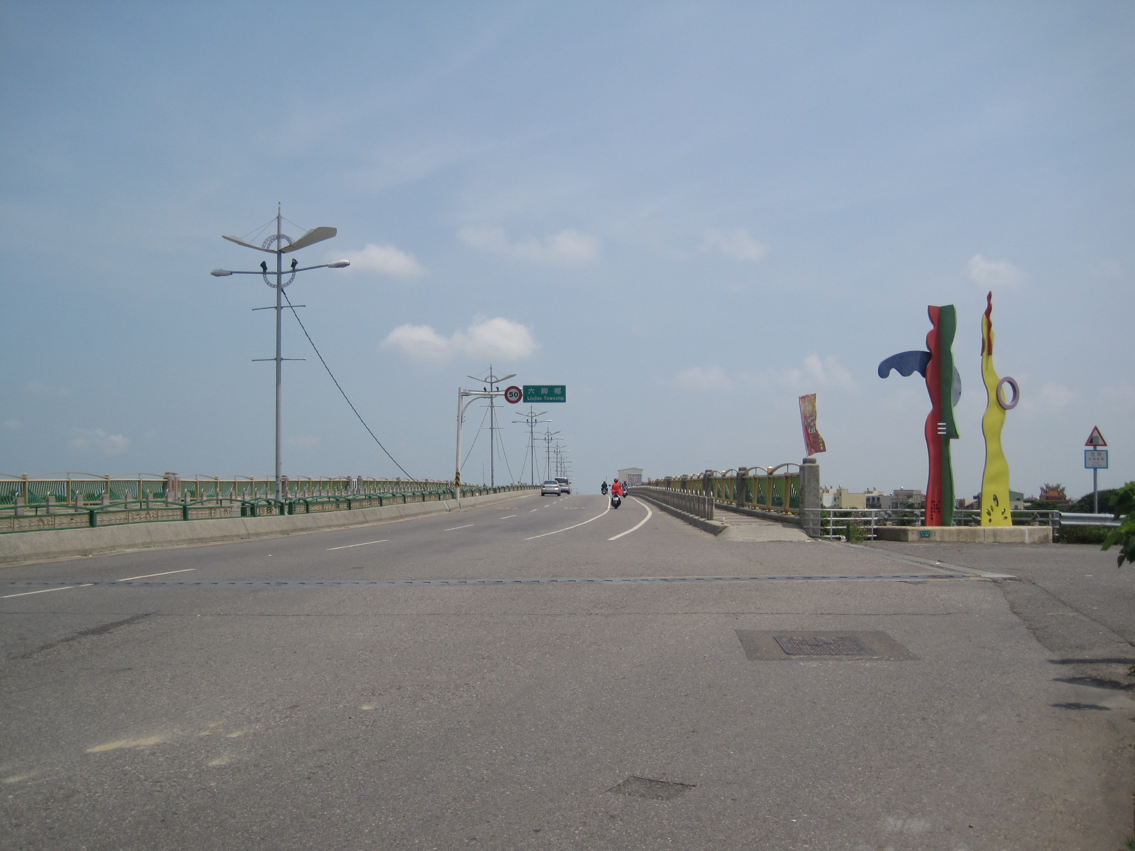 台19線上的朴子大橋（從朴子市端拍攝）